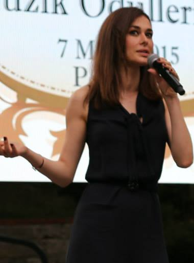 Ayşe Hatun Önal ve Onurr, 12. Radyo Boğaziçi Müzik Ödülleri'nde "Güm Güm" şarkısını seslendirirken.